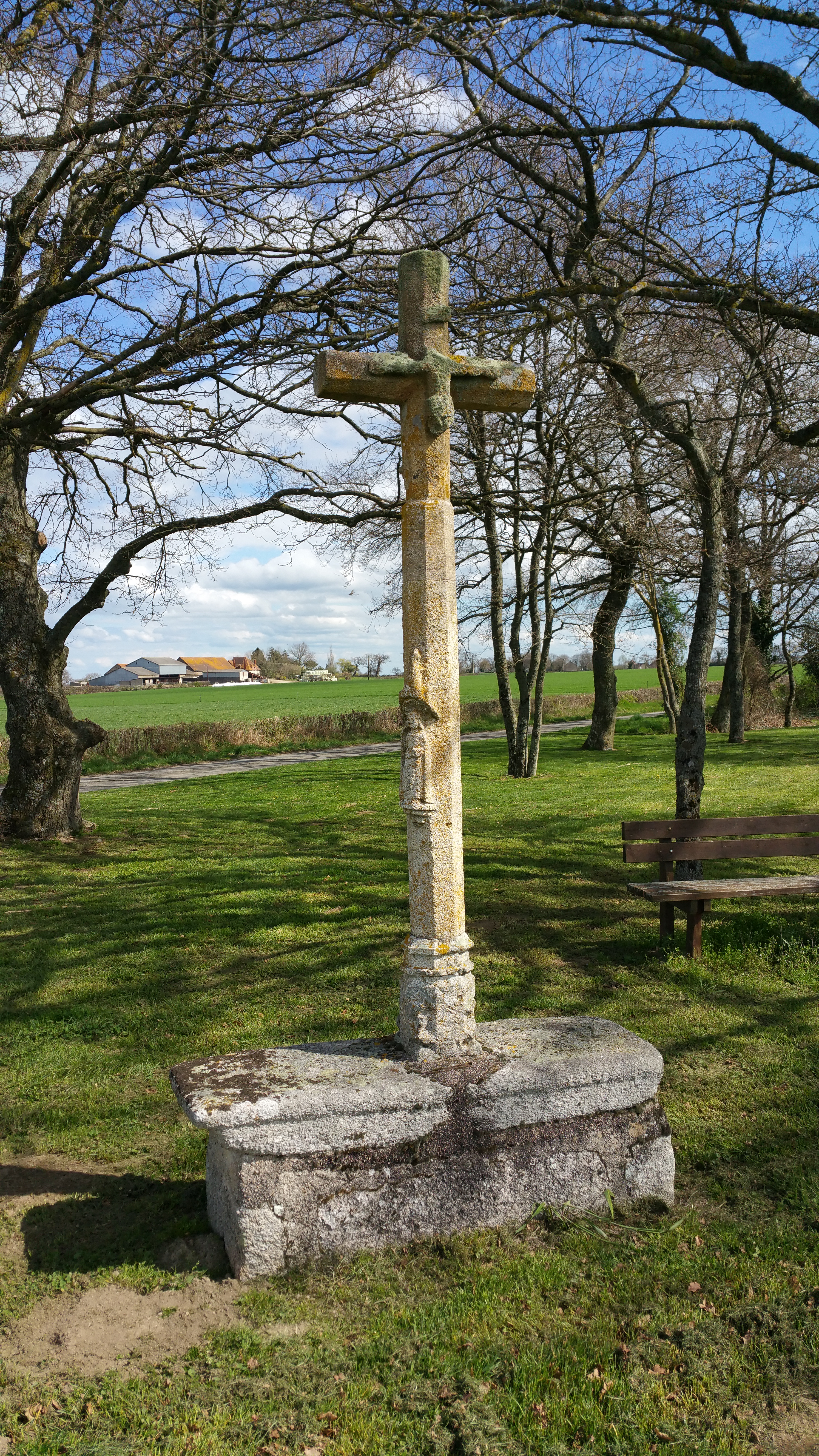 Croix des Âges à Aurignat.